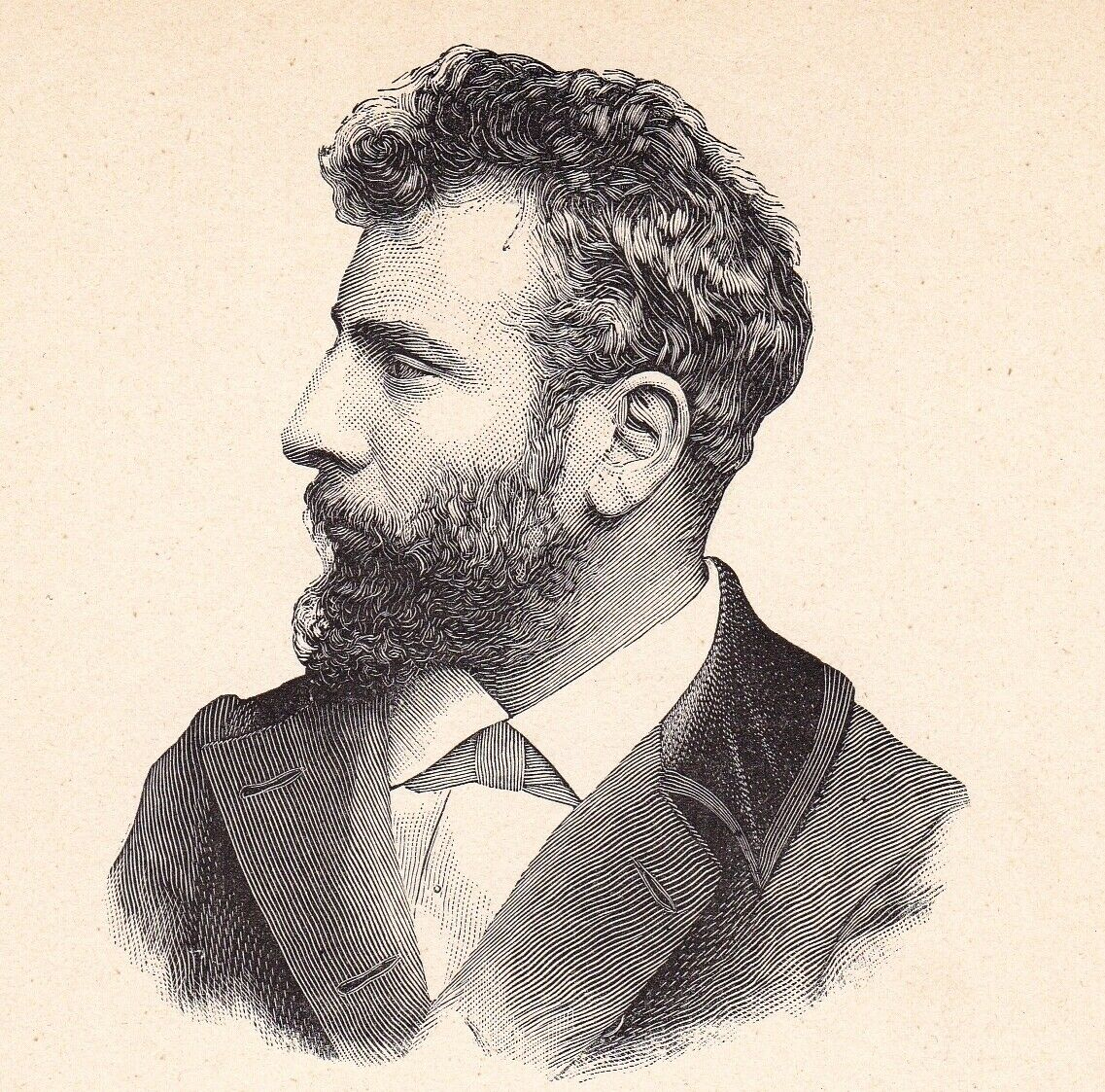 Henri-Jean Guillaume Martin (1860-1943), French Impressionnist painter